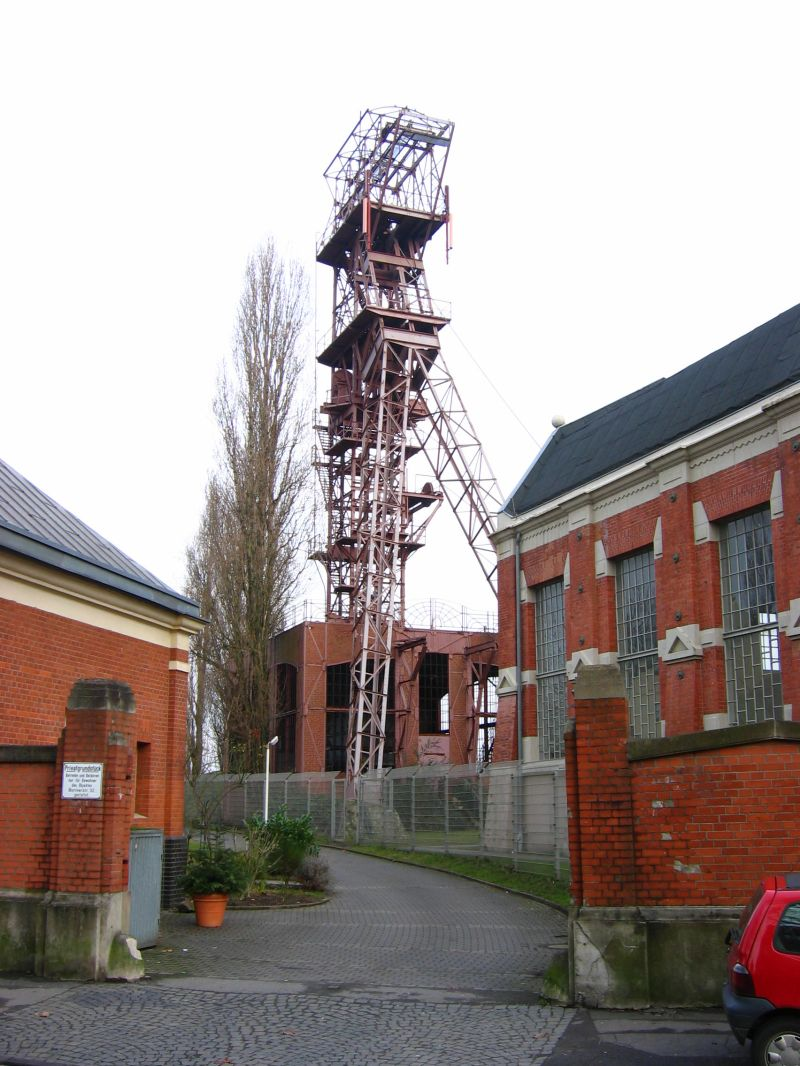 Schachtanlage Oberschuir der Zeche Consolidation (Gelsenkirchen) eigenes Foto